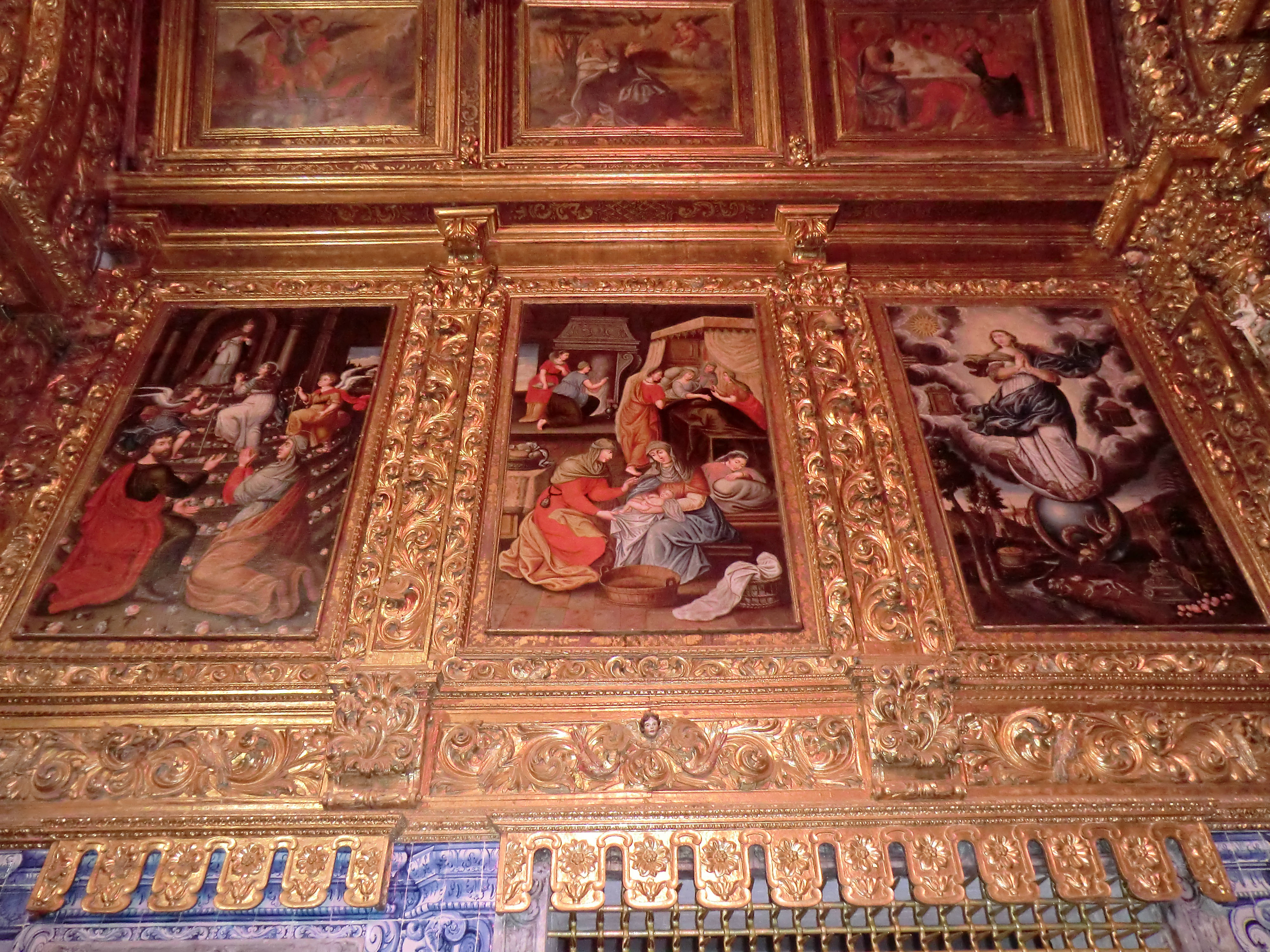 Igreja das Carmelitas ou Igreja de São João Evangelista This file was uploaded for Wiki Loves Monuments in Portugal with the unique identifier 71150.